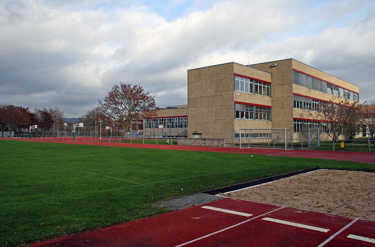 Sportplatz des Friedrich-Dessauer-Gymnasiums Aschaffenburg